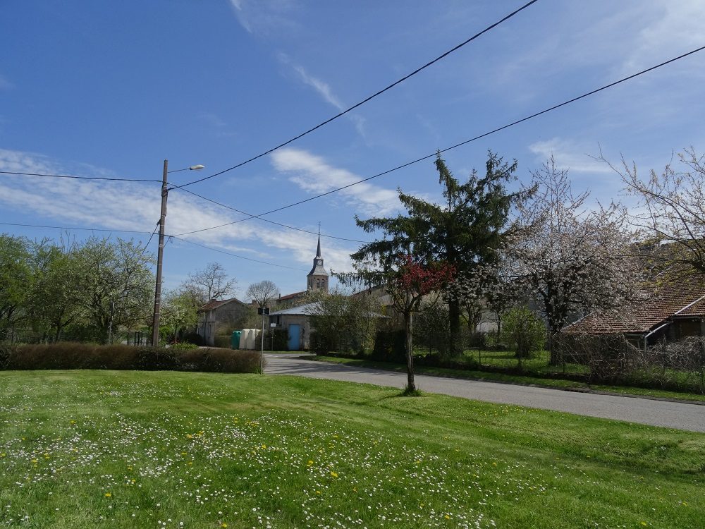 Vue générale sur la commune